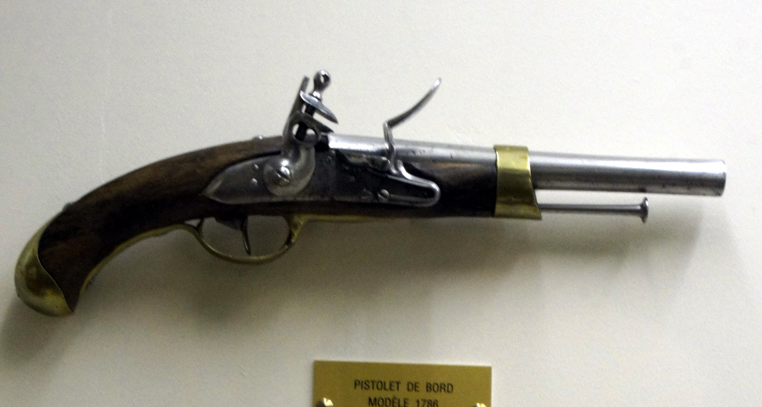 présenté au musée de Reims.